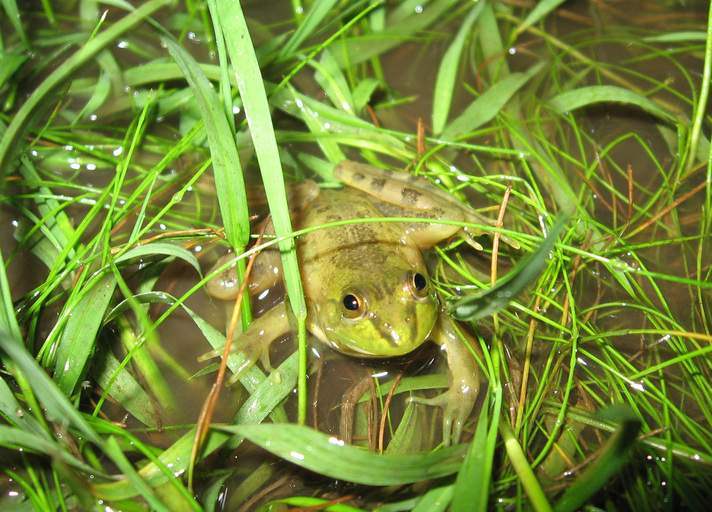 Podonectes minutus